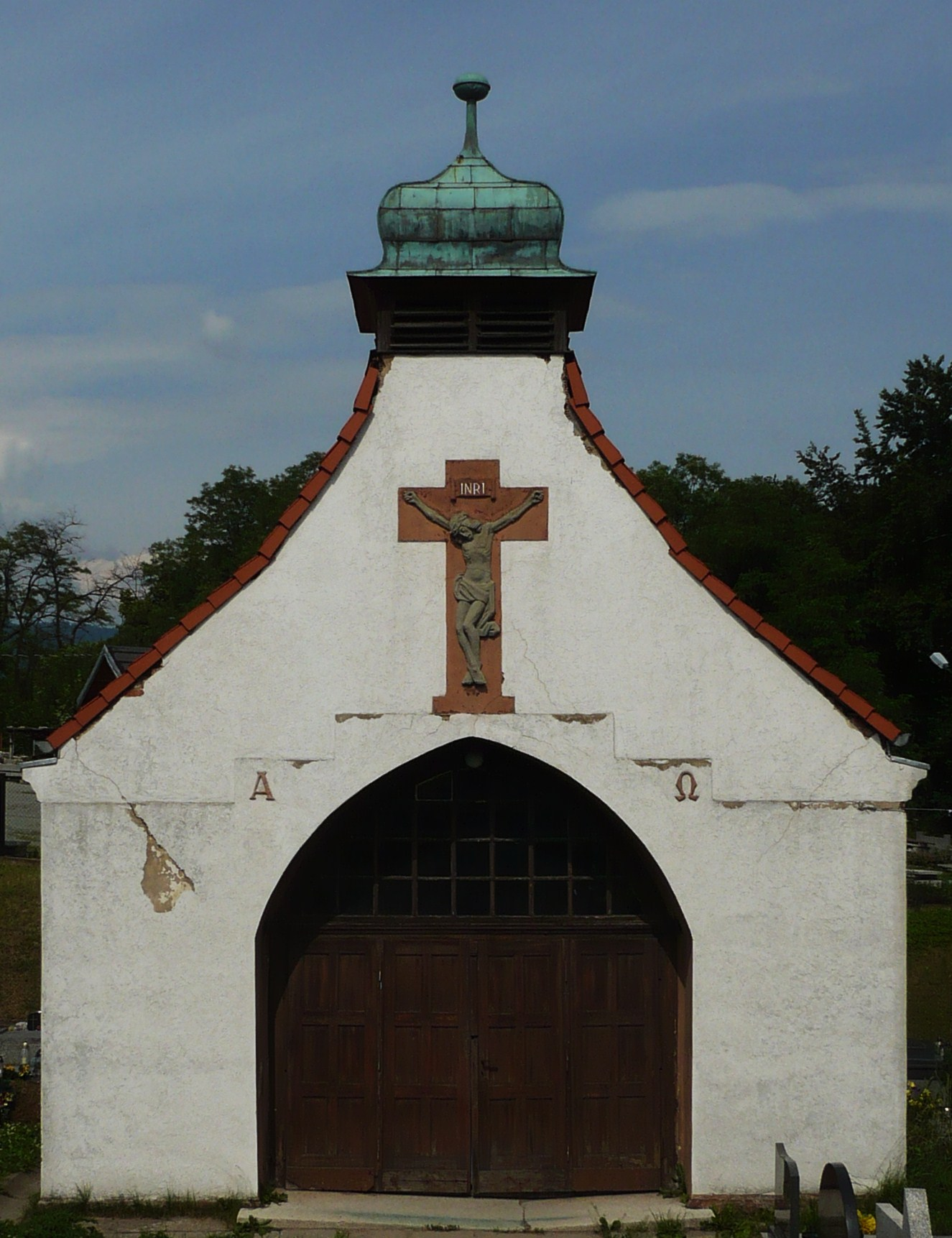 Nowa Ruda, ul. Cmentarna - cmentarz komunalny (kaplica cmentarna)